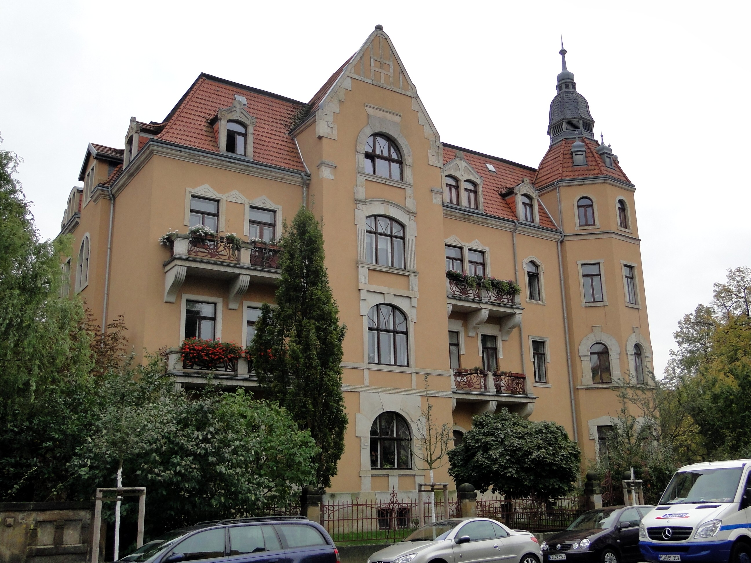 Jugendstilbau in Dresden